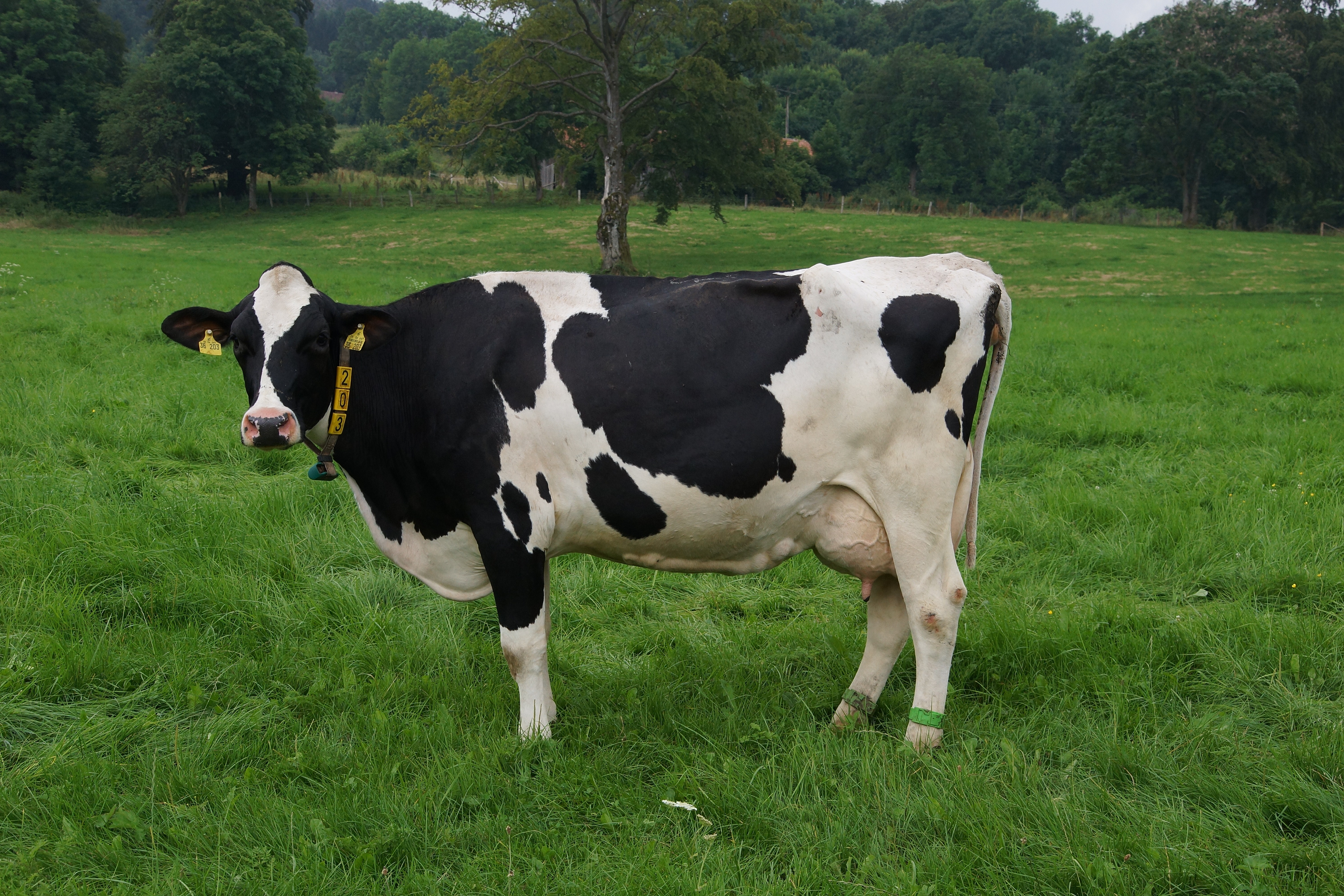 Trockenstehende Holstein Frisian Kuh auf einer Weide in der Rhön